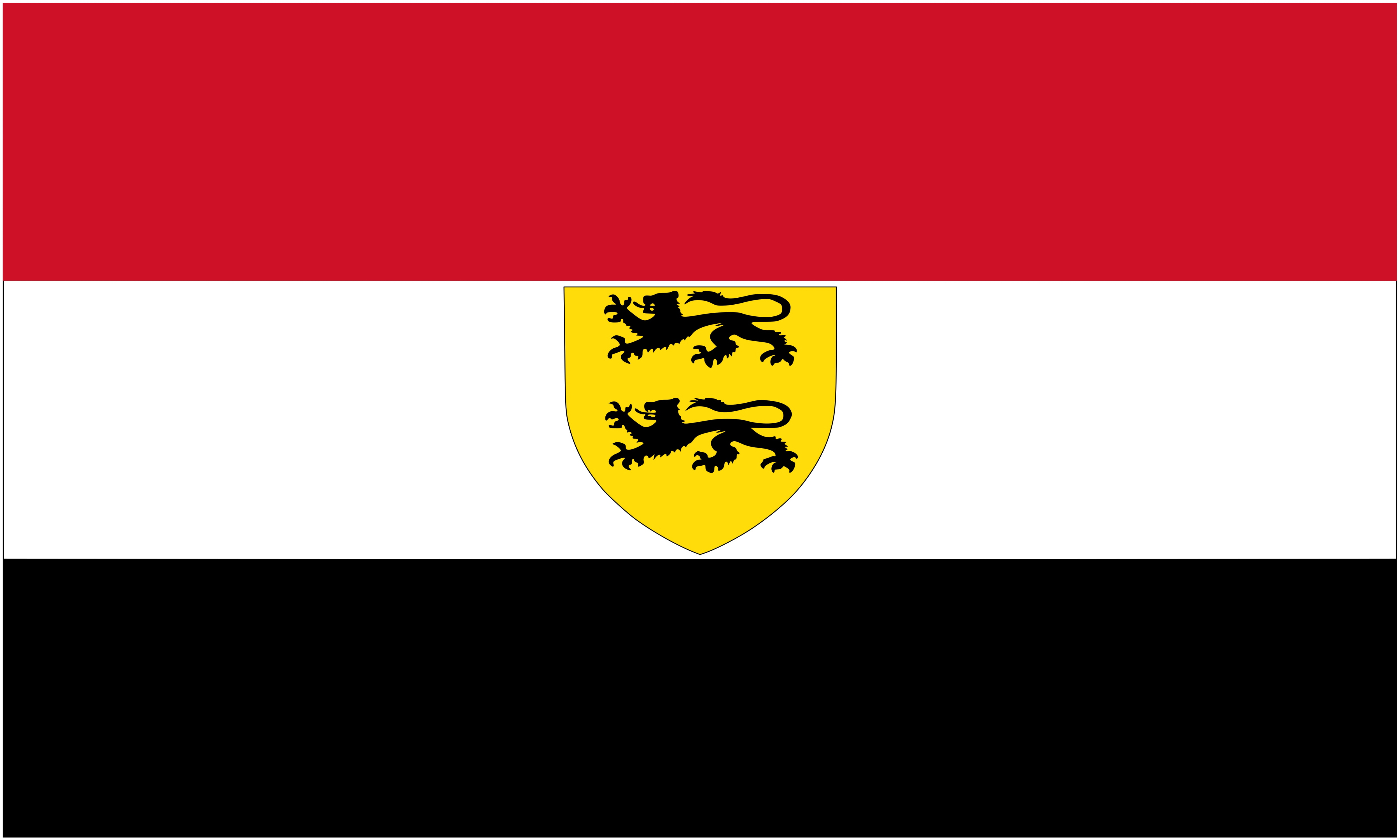 Vlag van de micronatie Flandrensis. Origineel ontwerp dateert uit 2008 en werd gepubliceerd in Het Belang van Limburg en Gazet van Antwerpen dd. 2012-07-20